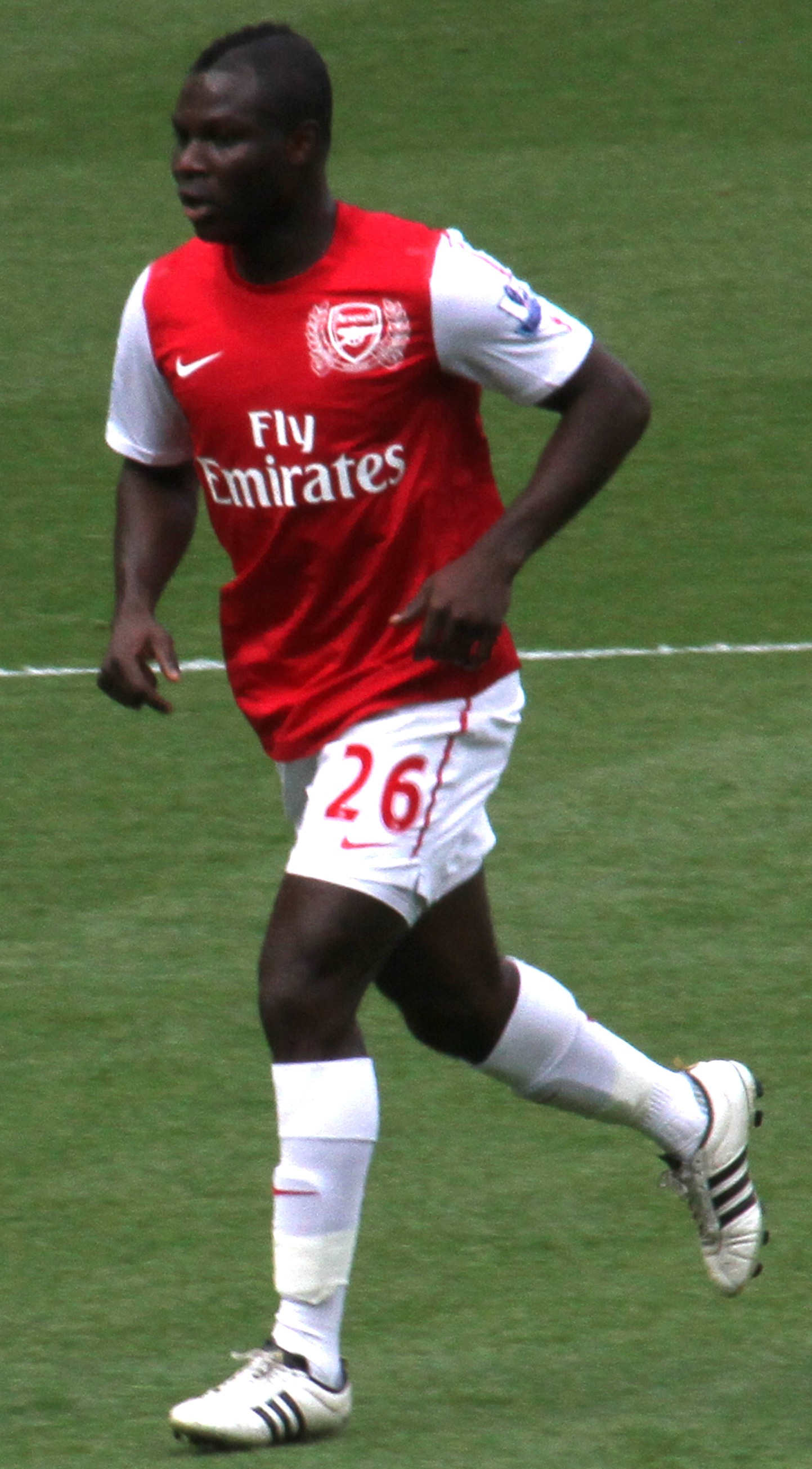 Эммануэль Фримпонг